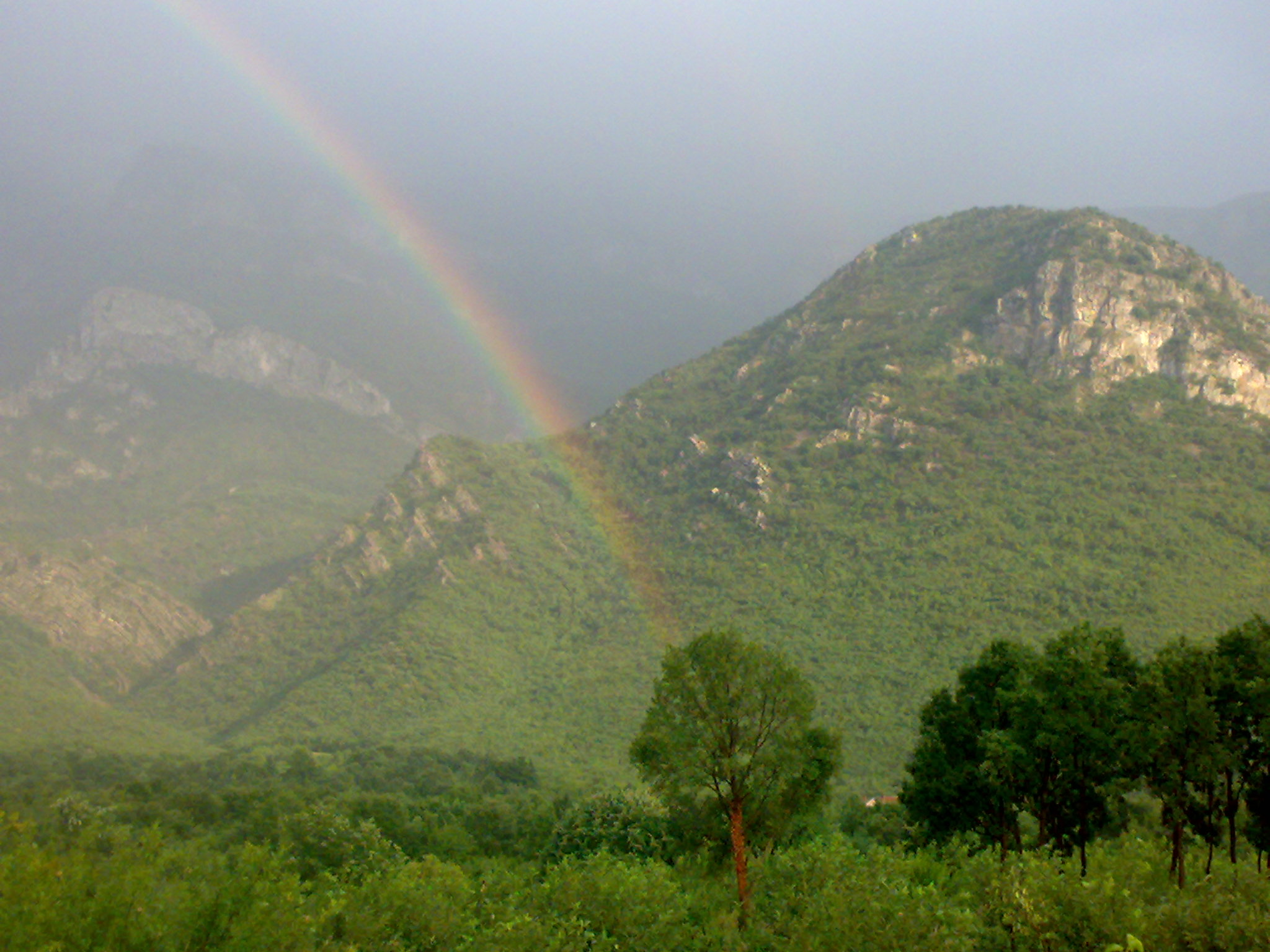 Brdo Orlinka, Kuti (Mostar)